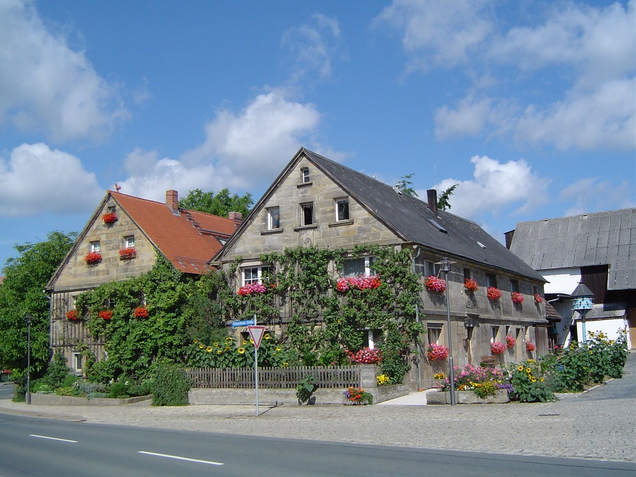 Mistelbach (Oberfranken) - Dorfmitte